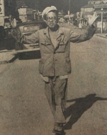 稲垣足穂